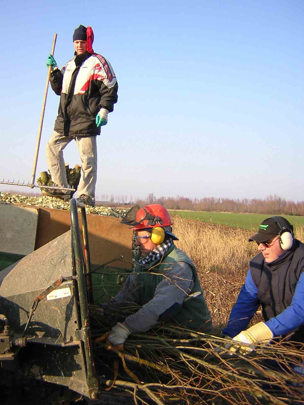 Vrijwilligers van Natuurpunt verhakselen takken na het knotten van wilgen